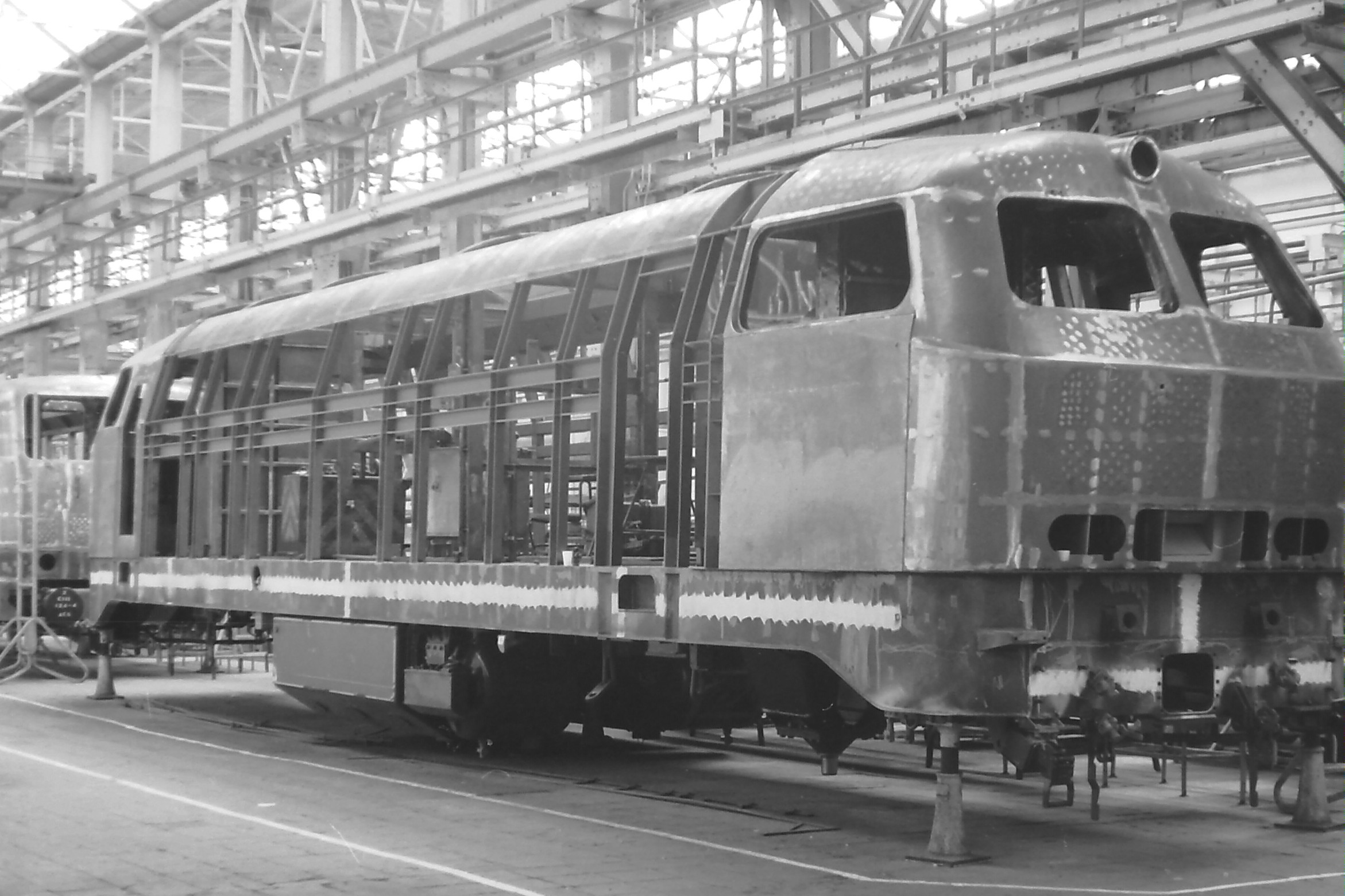 Bau einer Diesellokomotive der Reihe 218 bei Krupp in Halle M3, ausgestellt am Tag der offenen Tür am 2. September 1978